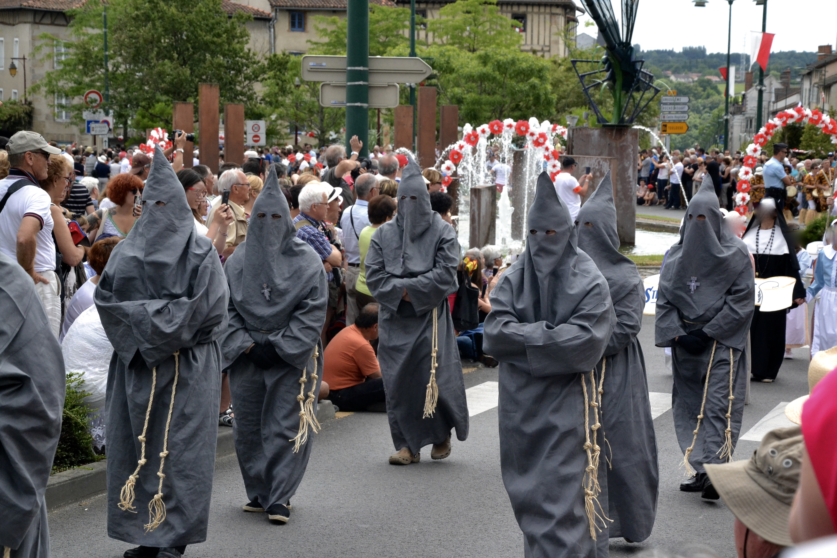 Défilé des Ostensions 2016 de Saint-Junien (Haute-Vienne, France). Les Pénitents gris.